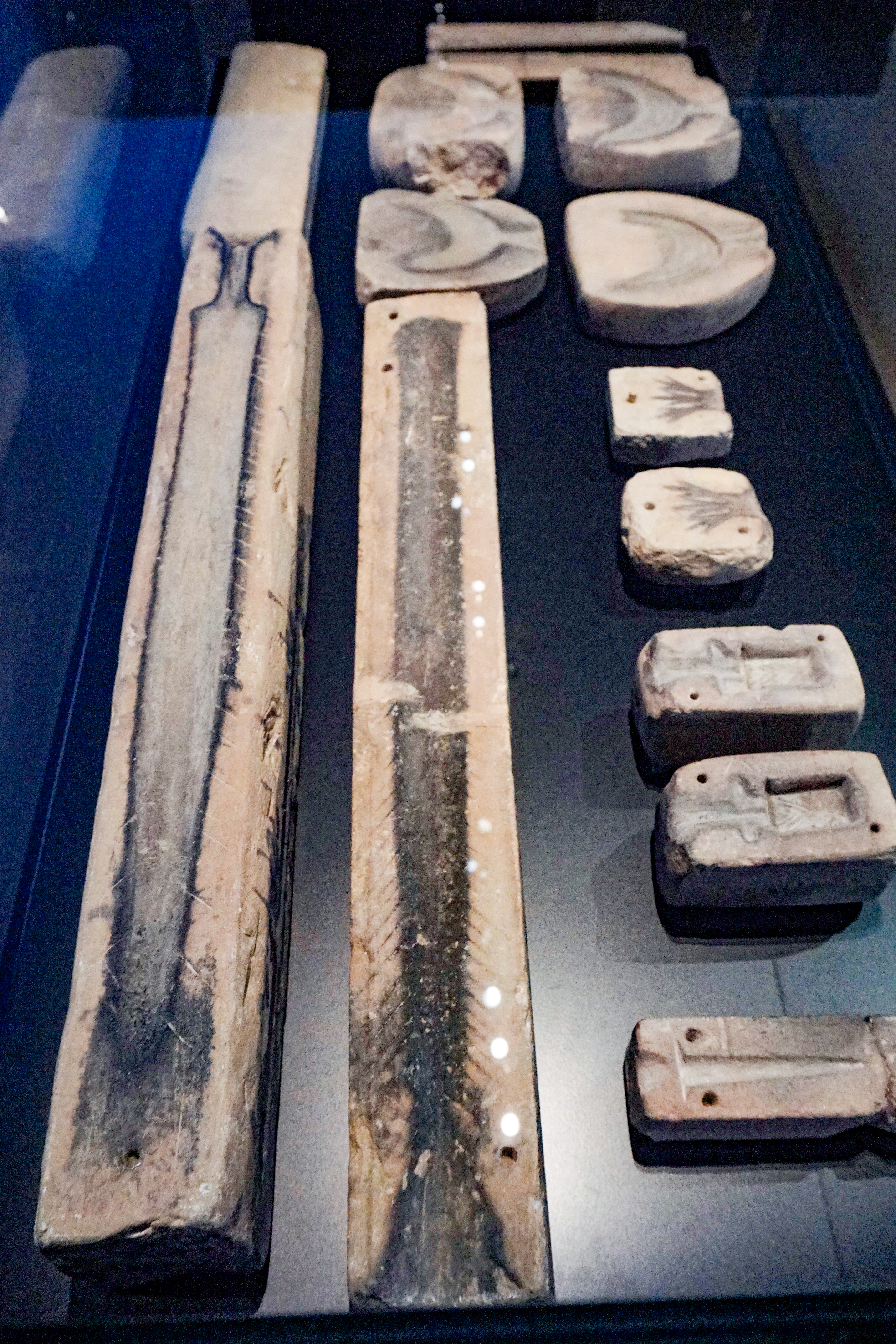 Depotfund mit 18 Gussformen, Lettenkohlensandstein, Neckargartach, "Nordheimer Hohl", um 800 vor Christus